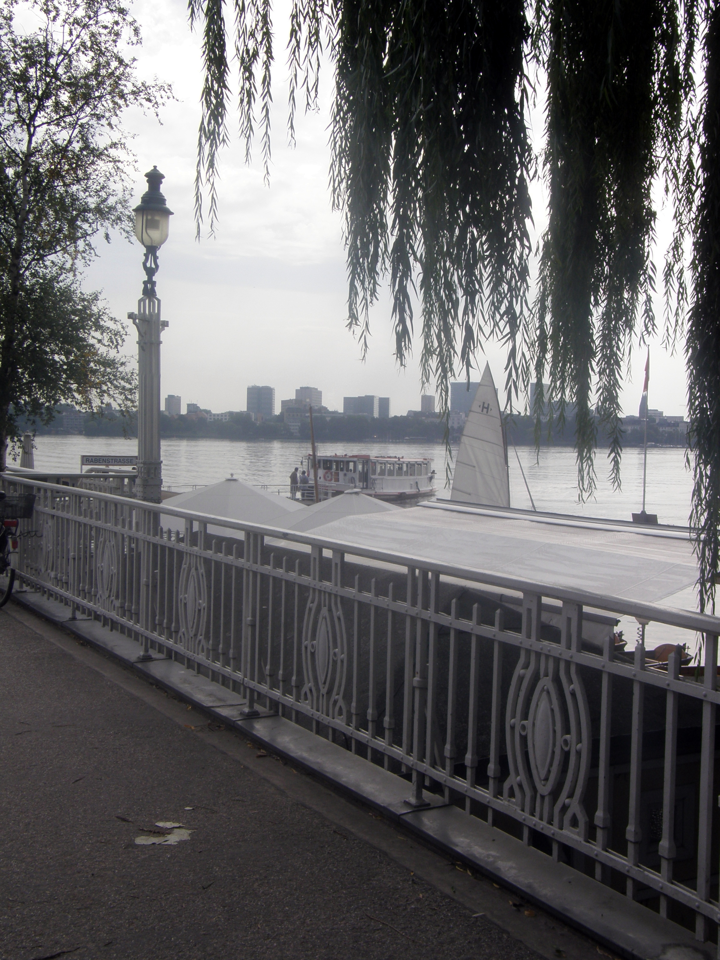 Hamburg Harvestehuder Weg Anleger Alte Rabenstraße Alster Jugendstil Denkmalschutz